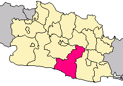 Carte indonésienne